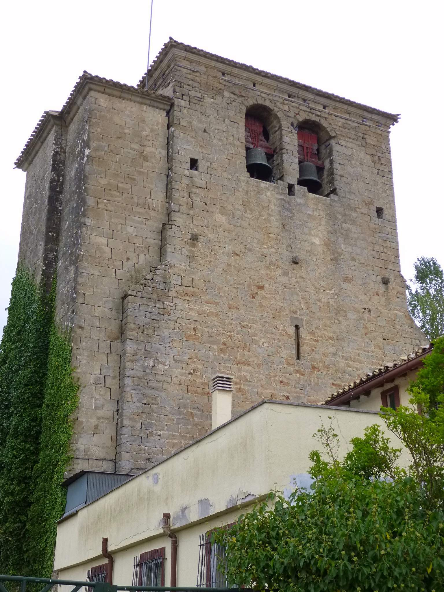 Iglesia de San Miguel (Noáin)